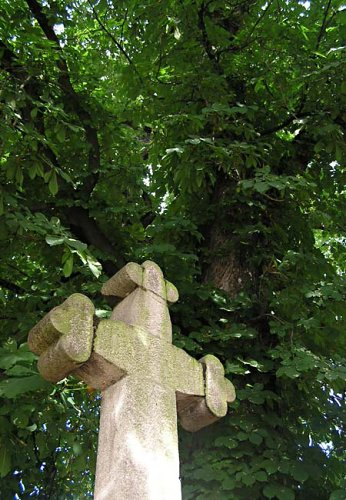 Kříž i kaštan stojí na bývalém hřbitově